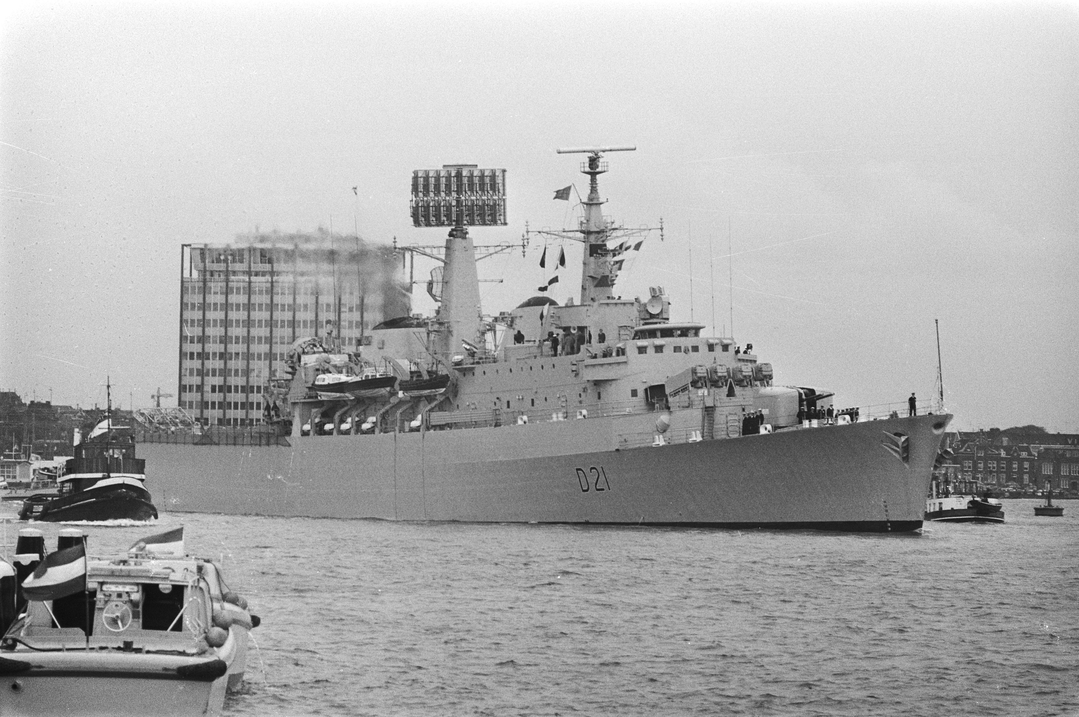 Collectie / Archief : Fotocollectie Anefo Reportage / Serie : [ onbekend ] Beschrijving : NAVO eskader bezoekt Amsterdam, vlaggeschip HNS Norfolk Datum : 3 juni 1976 Locatie : Amsterdam, Noord-Holland Trefwoorden : vlaggeschepen Fotograaf : Peters, Hans / Anefo Auteursrechthebbende : Nationaal Archief Materiaalsoort : Negatief (zwart/wit) Nummer archiefinventaris : bekijk toegang 2.24.01.05 Bestanddeelnummer : 928-6223